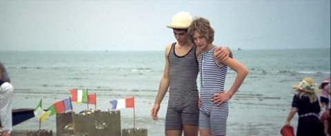 Képkocka a „Halál Velencében” című filmből